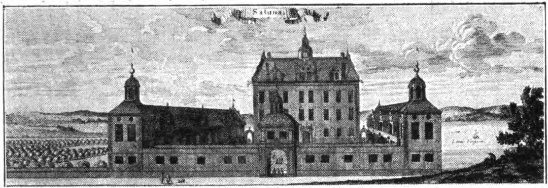 Sätuna sätesgård i Suecia antiqua et hodierna av Eric Dahlbergh. Illustration i Agneta Horns lefverne från 1908 s 104